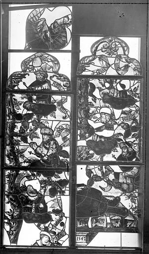 Vitrail : fragments fenêtre D.